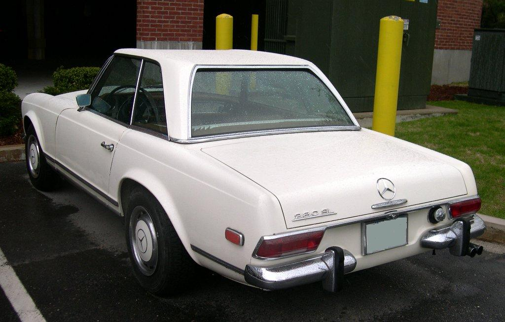 Mercedes-Benz W113 280 SL